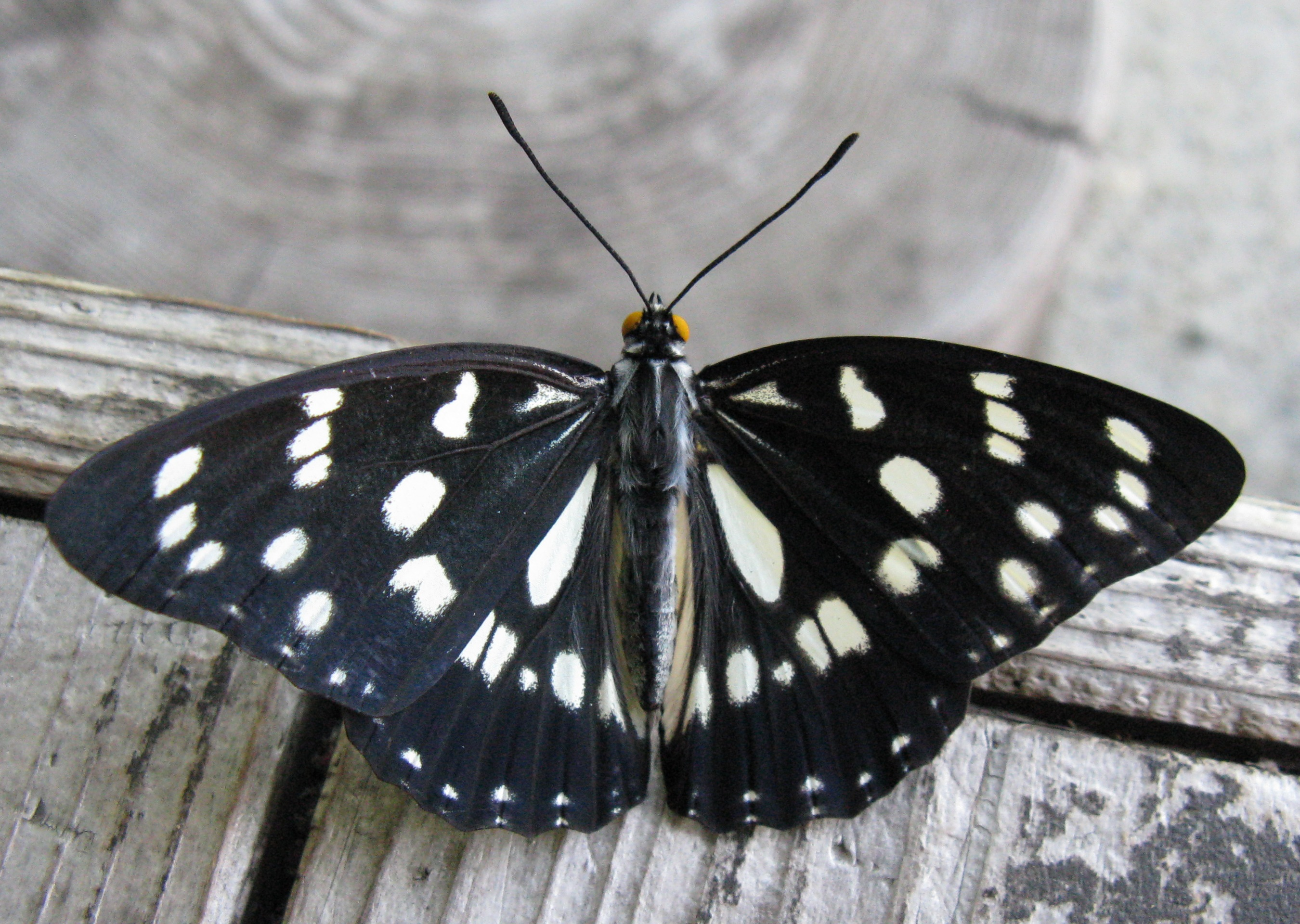 Scientific name Hestina persimilis japonica